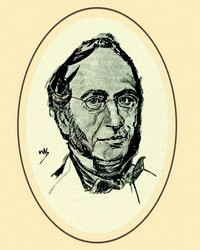 Porträt des Aachener Naturforschers und Mundartdichters Joseph Müller